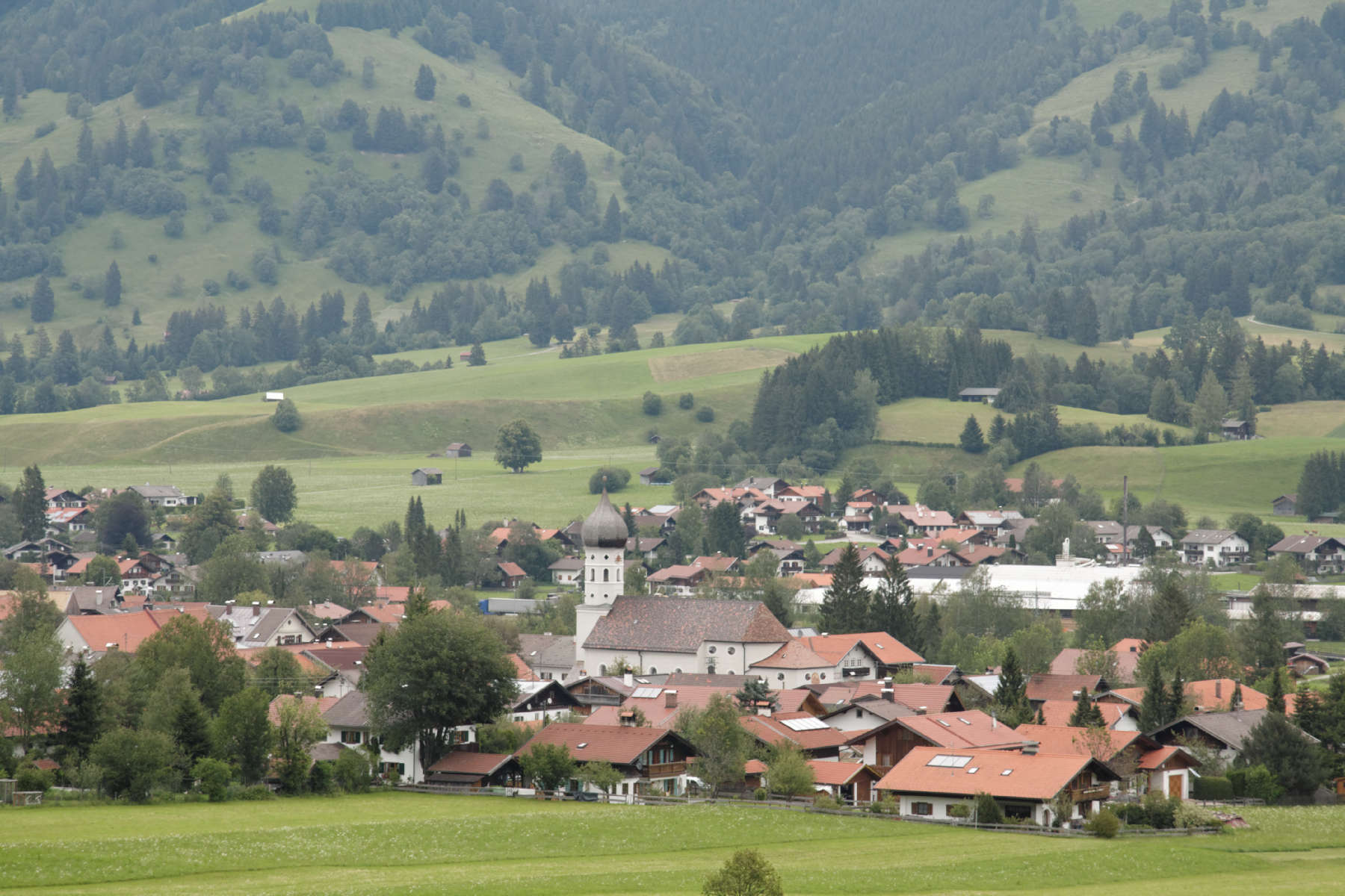 Unterammergau, Blick von der Sommerrodelbahn